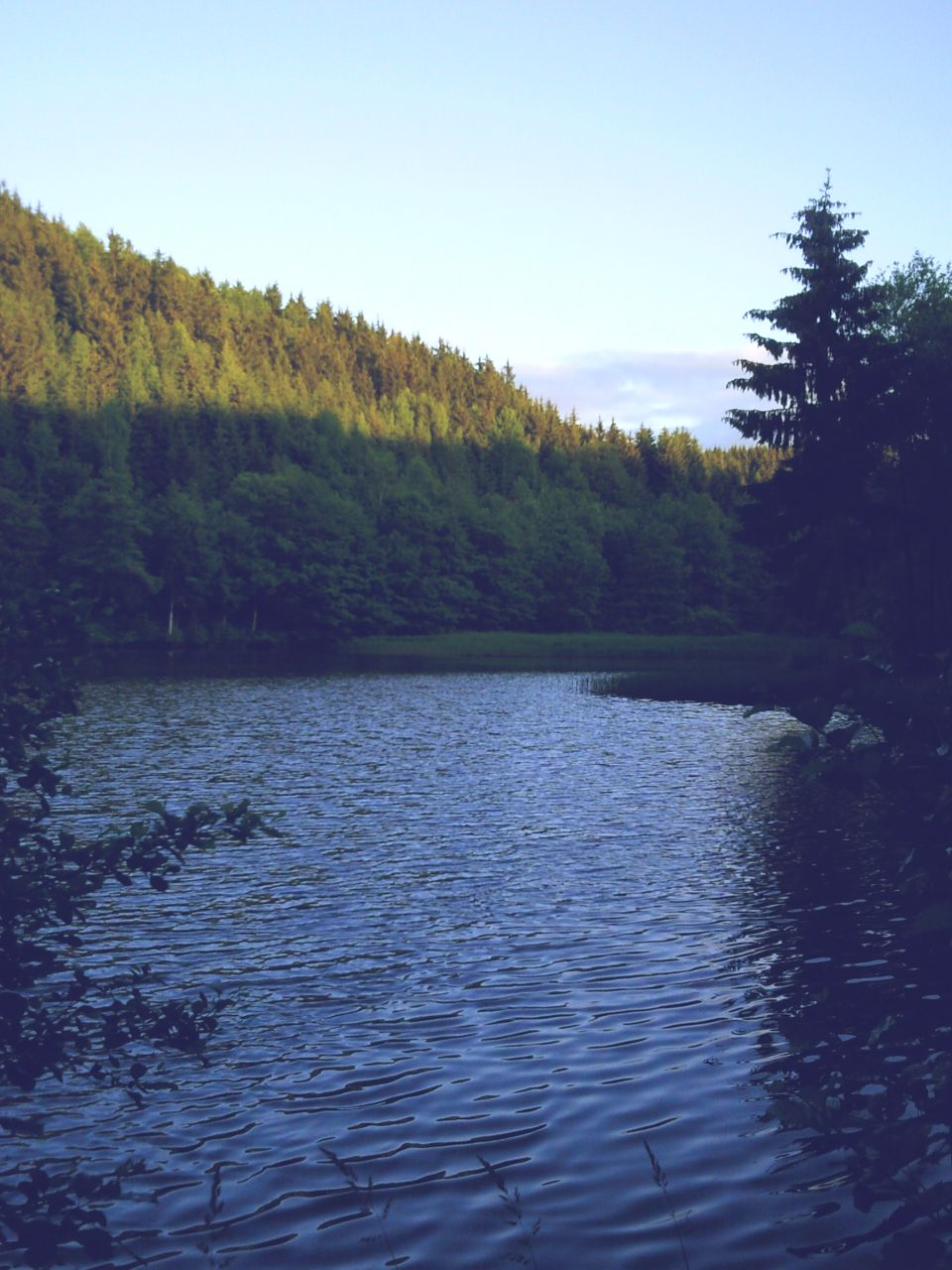 Blick zur Stauwurzel des Maliniusteichs